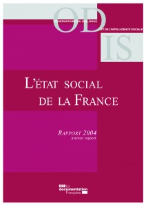 Rapport France 2004